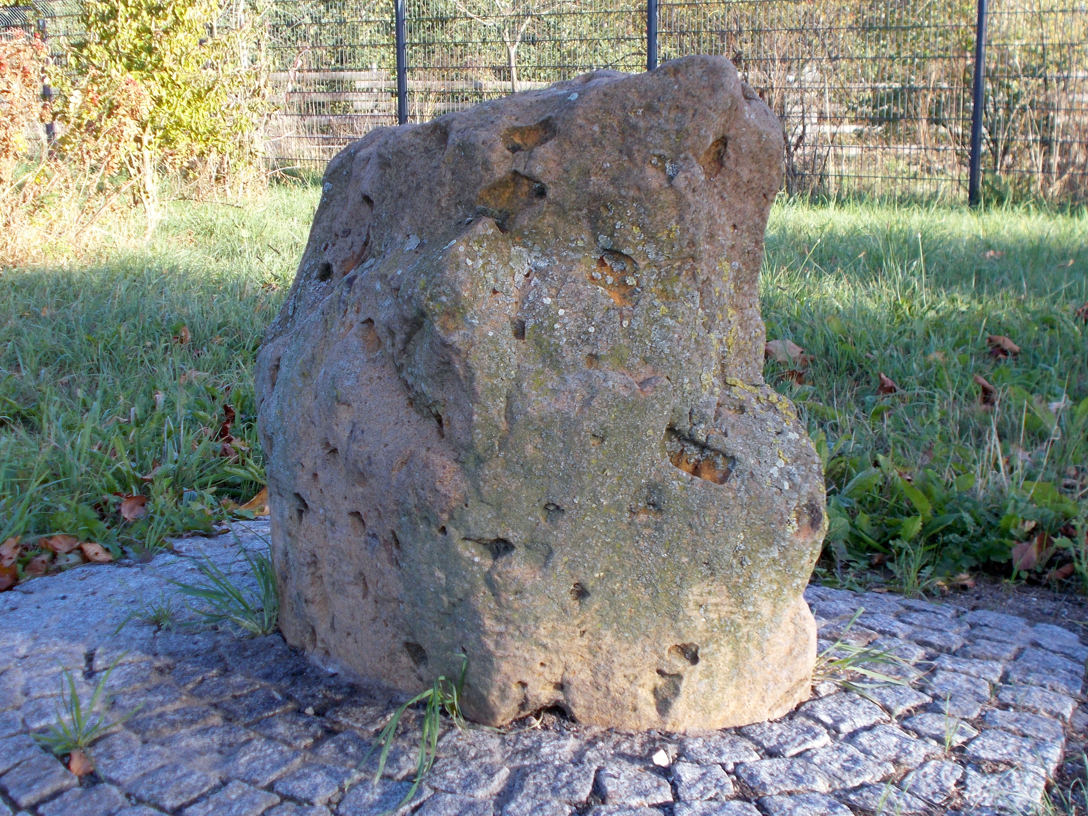 Findlingsweg Sonsbeck Station 3: Basalt